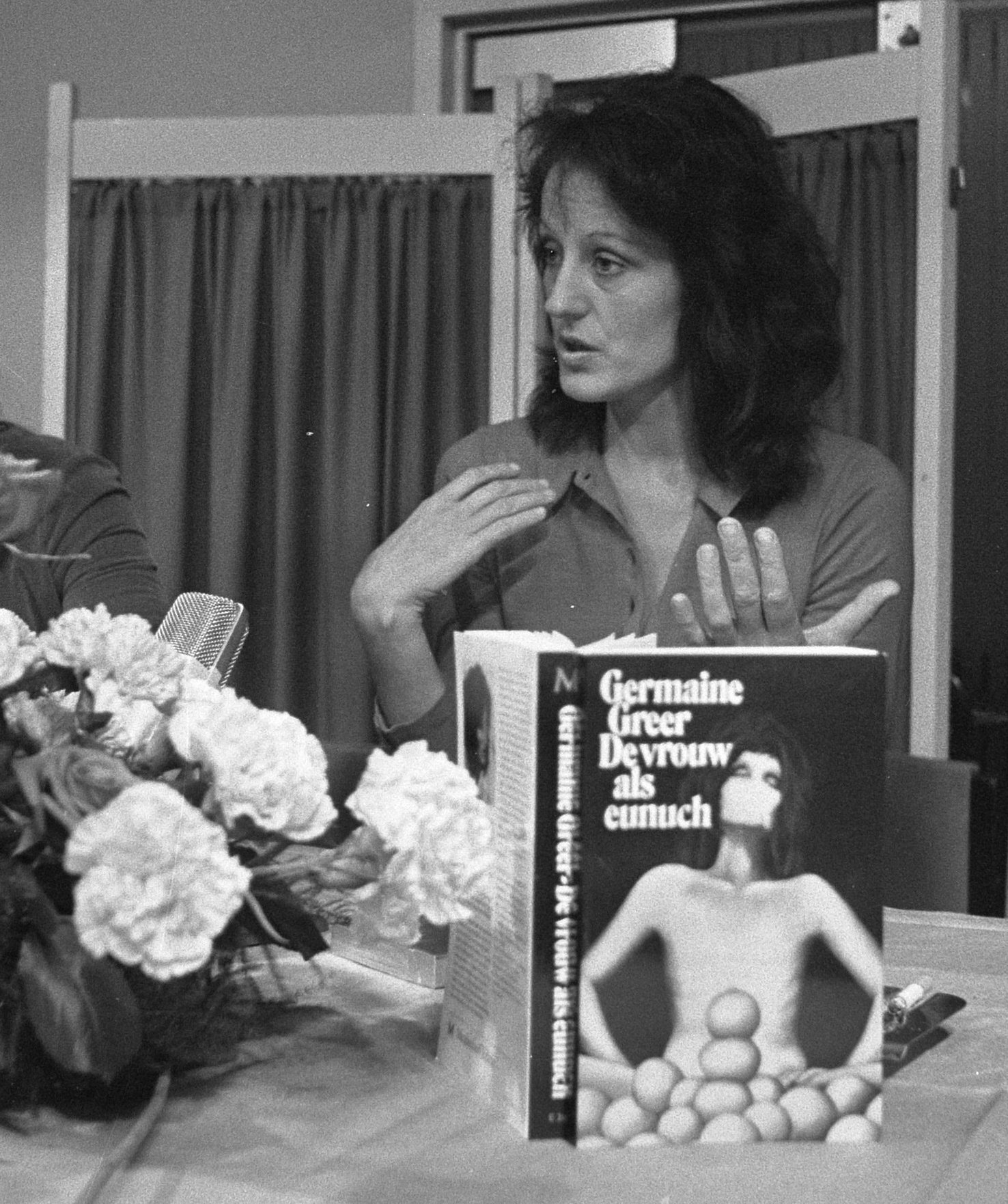 Germaine Greer in Amsterdam